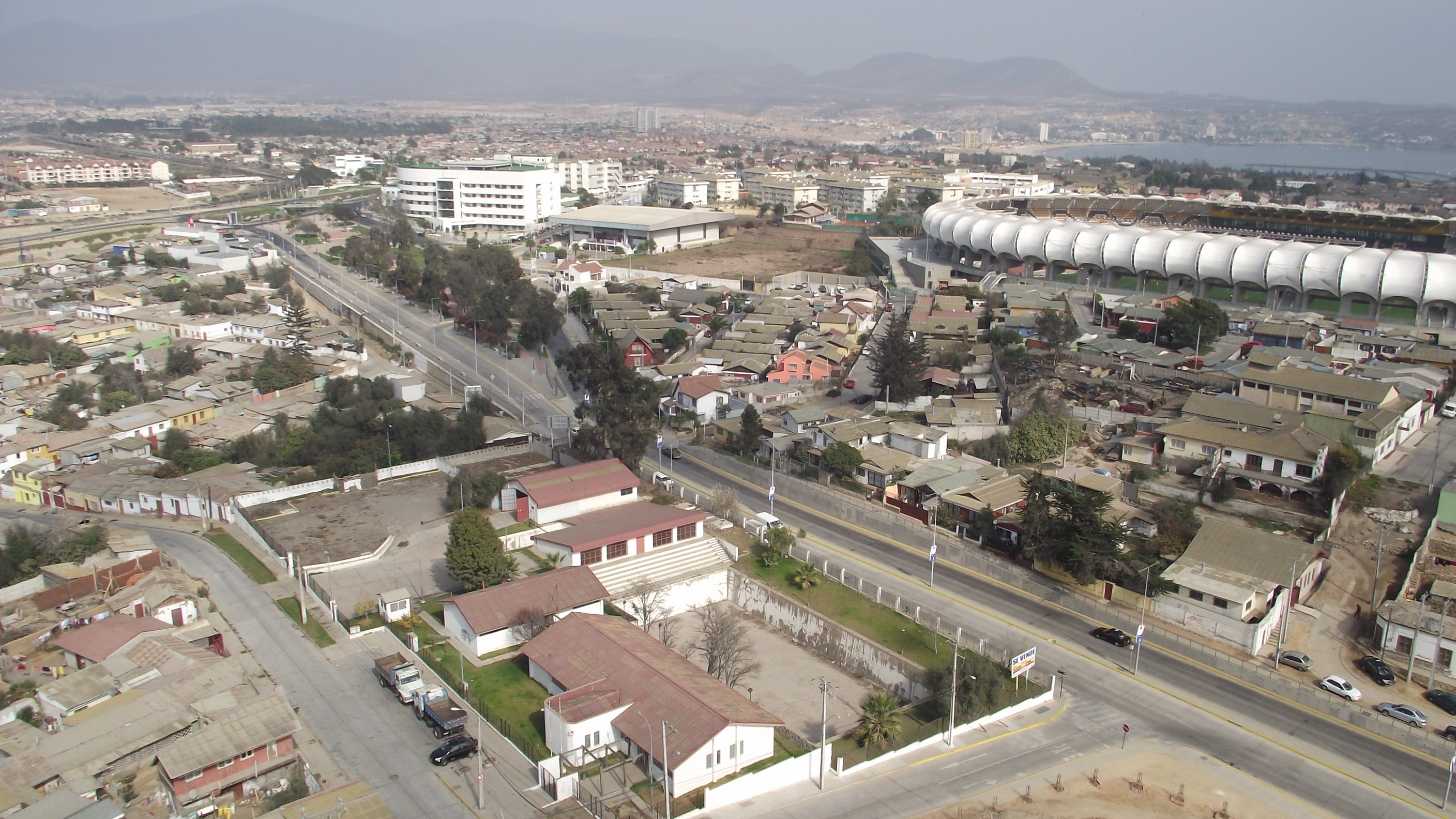 Avenida Videla, Estadio, Hospital y Parque 11 de Septiembre